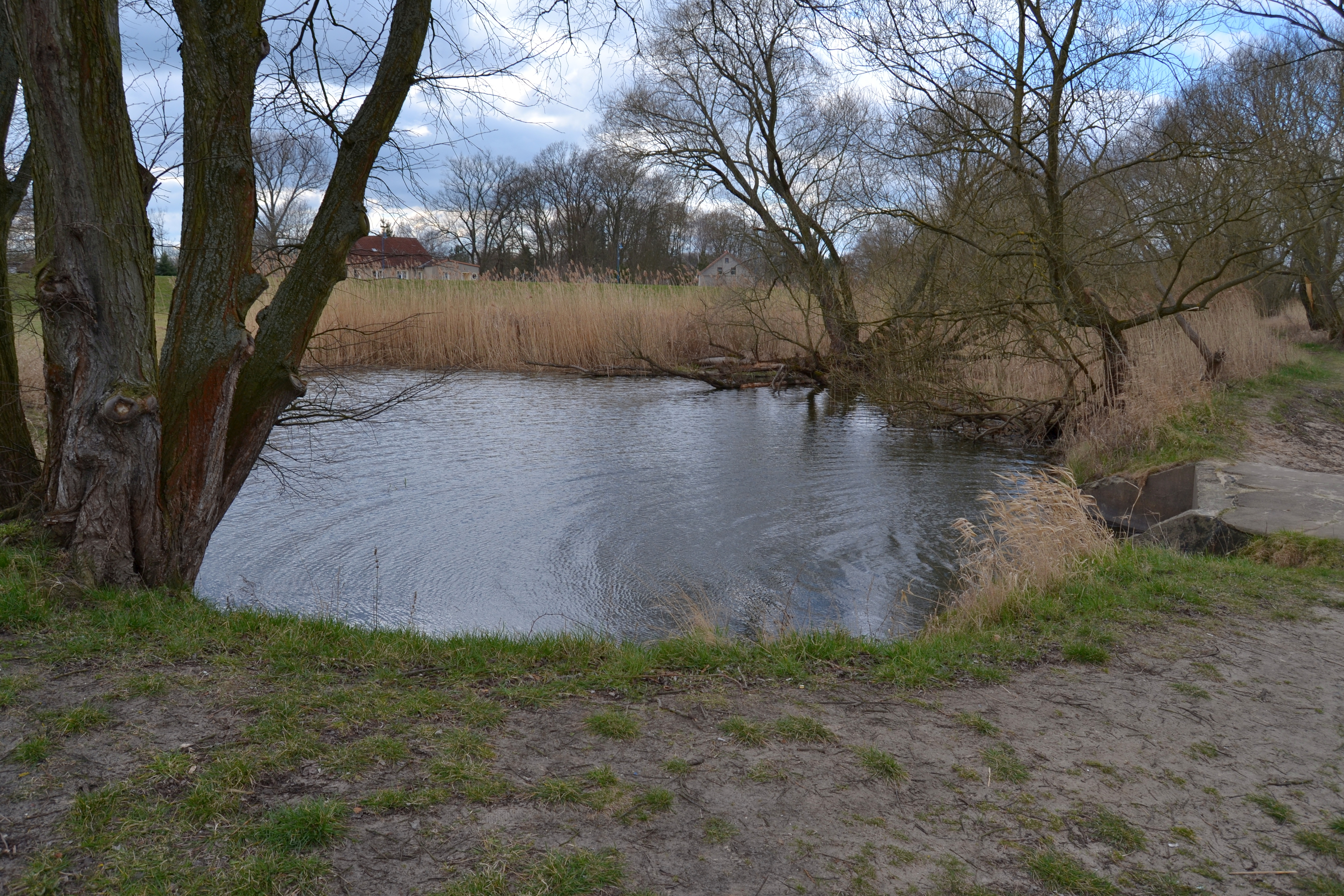 Badestelle am Oderarm in Kienitz/Letschin am Oder-Neiße-Radweg; Teil des LSG „Odervorland Groß Neuendorf-Lebus“, des FFH-Gebietes „Oderaue Kienitz“ sowie des Vogelschutzgebietes „Mittlere Oderniederung“. Fotoprojekt – Zwischen Berlin und Oder 2015 Photo project “Between Berlin and River Oder 2015” This template will categorize into Category:Zwischen Berlin und Oder 2015.